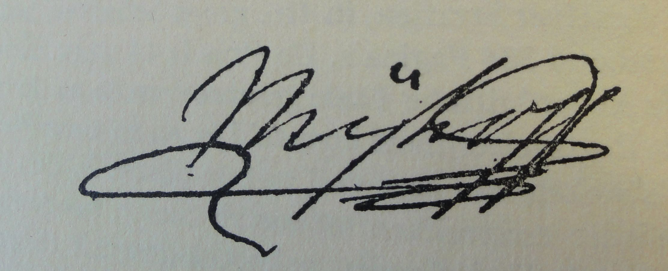 Handtekening Jacob Nijhoff (1723-1794)